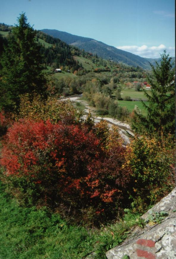 A Tatros folyó és völgye az ezeréves határról nézve (Gyimesbükk)